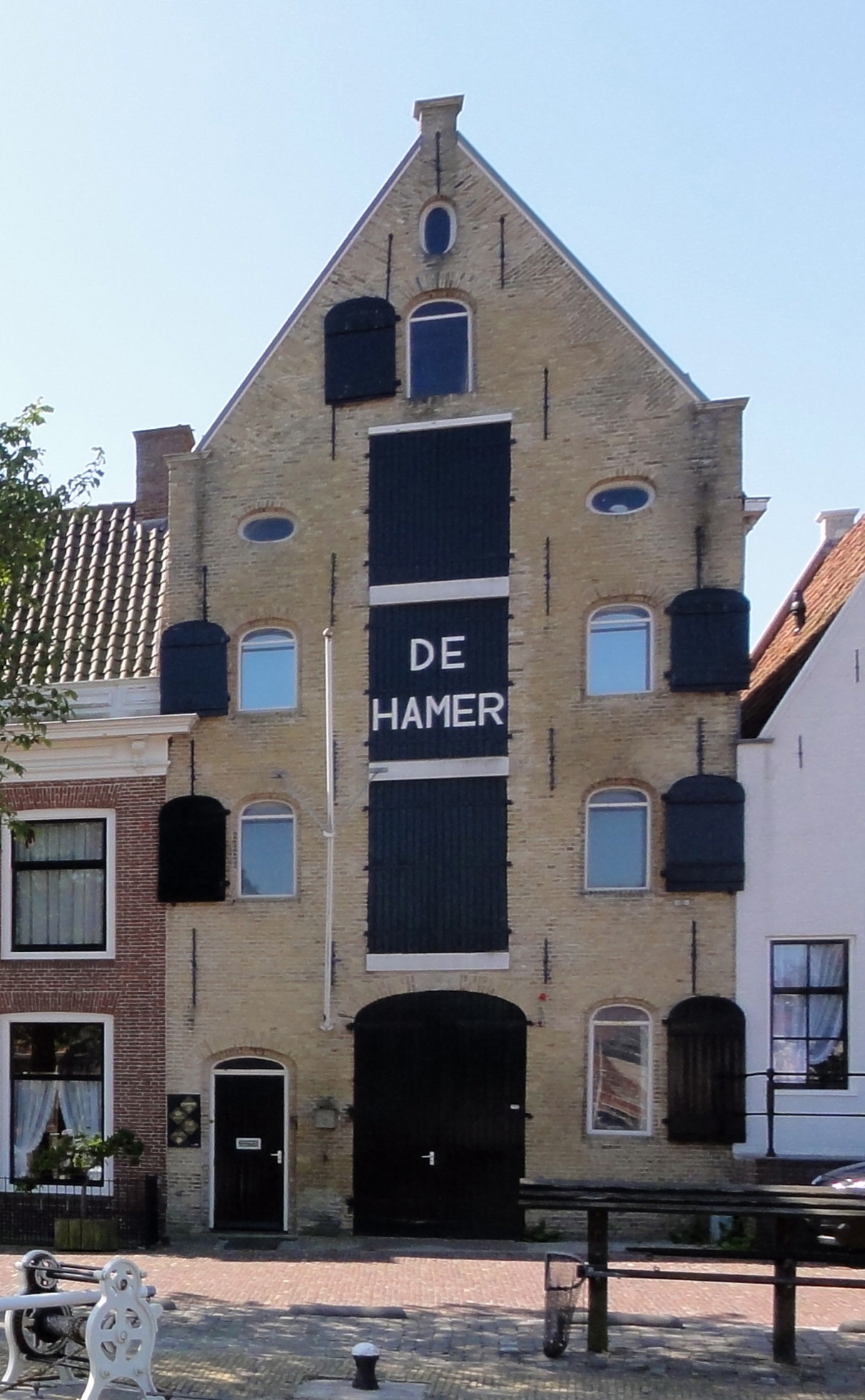 Rozengracht 6 "De Hamer" in Harlingen